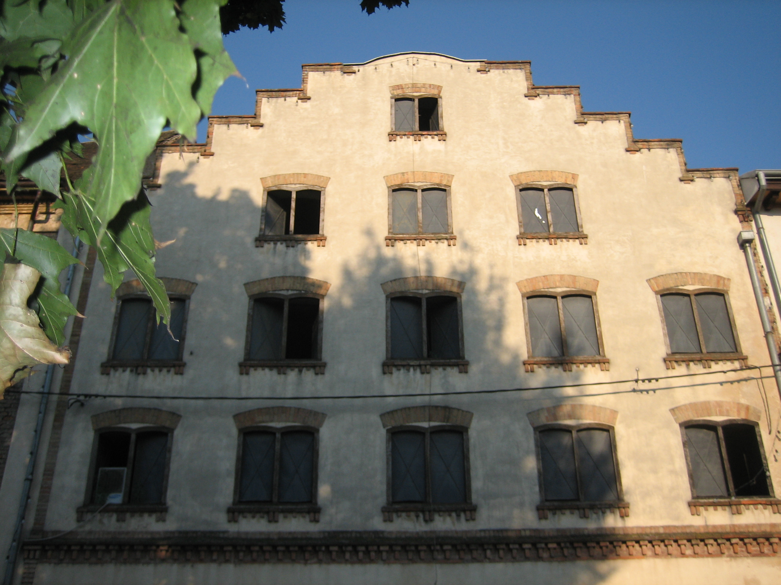 Old storehouse building known as the "Holland House" in Sisak, Croatia. 18th-19th cent. / Stara zgrada skladišta, poznata kao „Holandska kuća“ u Sisku, 18.-19. st.